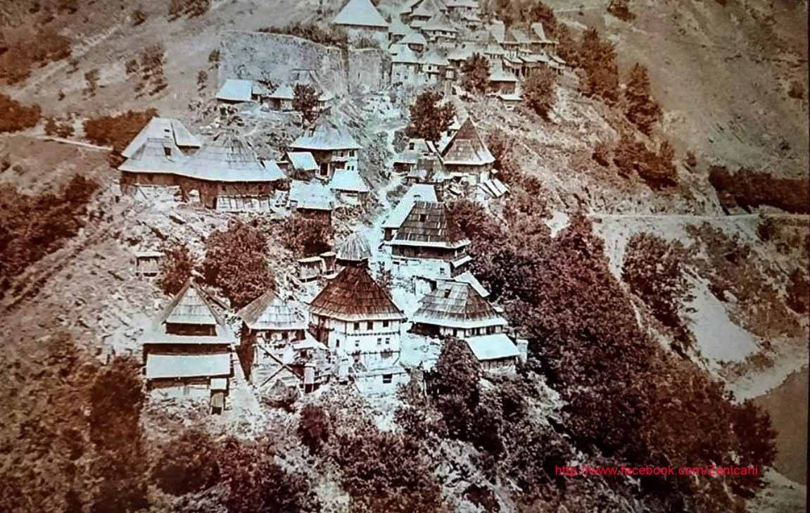 1895, Врандук, панорама; куће су посебна места становања